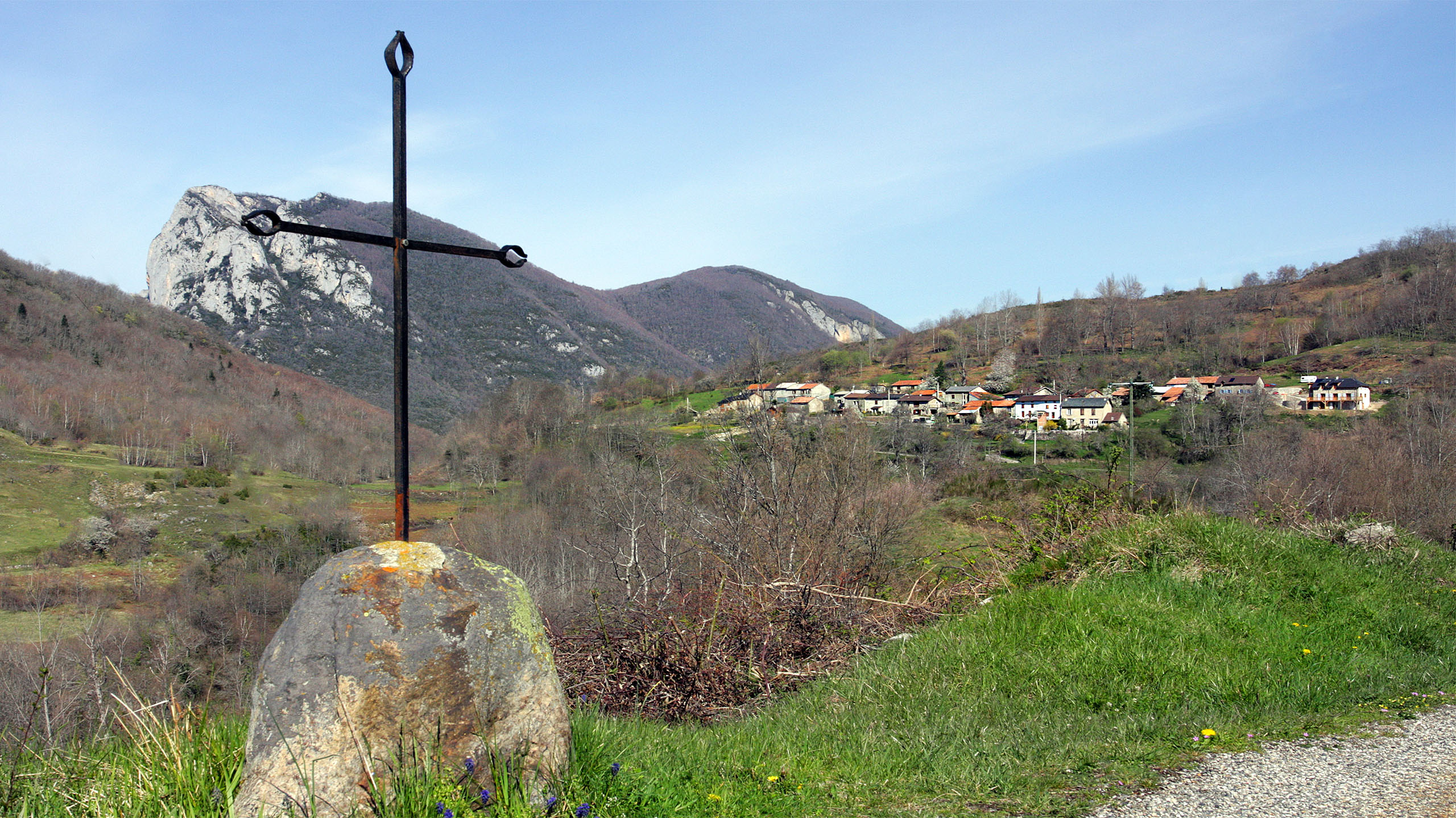 Vue de l'est